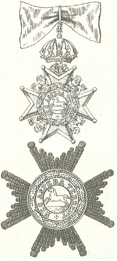 Deze tekening toont een ster met de correcte eikenbladeren van de civiele divisie van de Welfenorde.